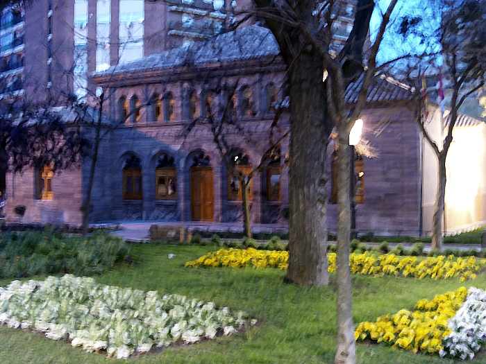 Casa de Baños de Puertollano